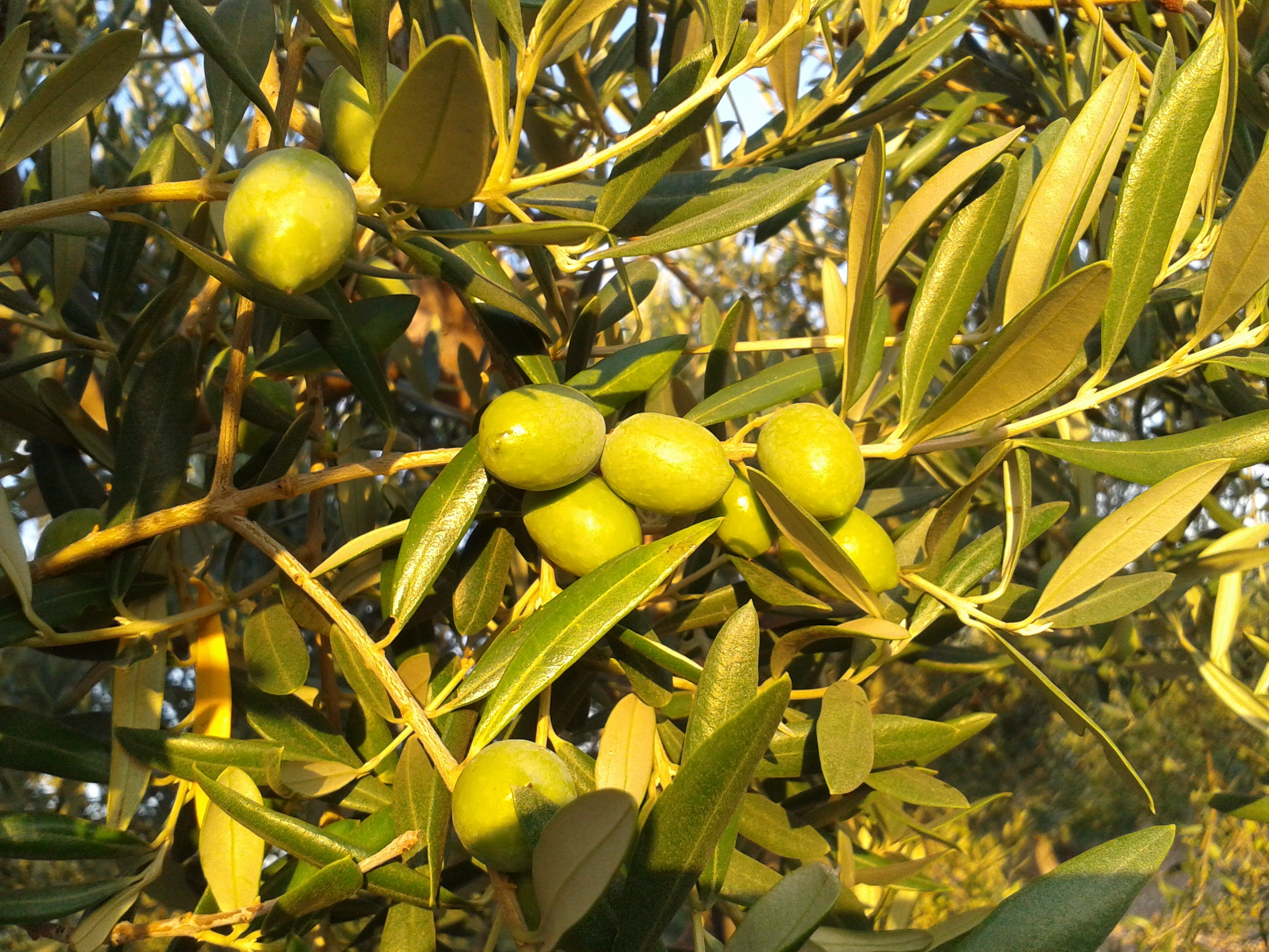 Unreife Oliven Biancolilla